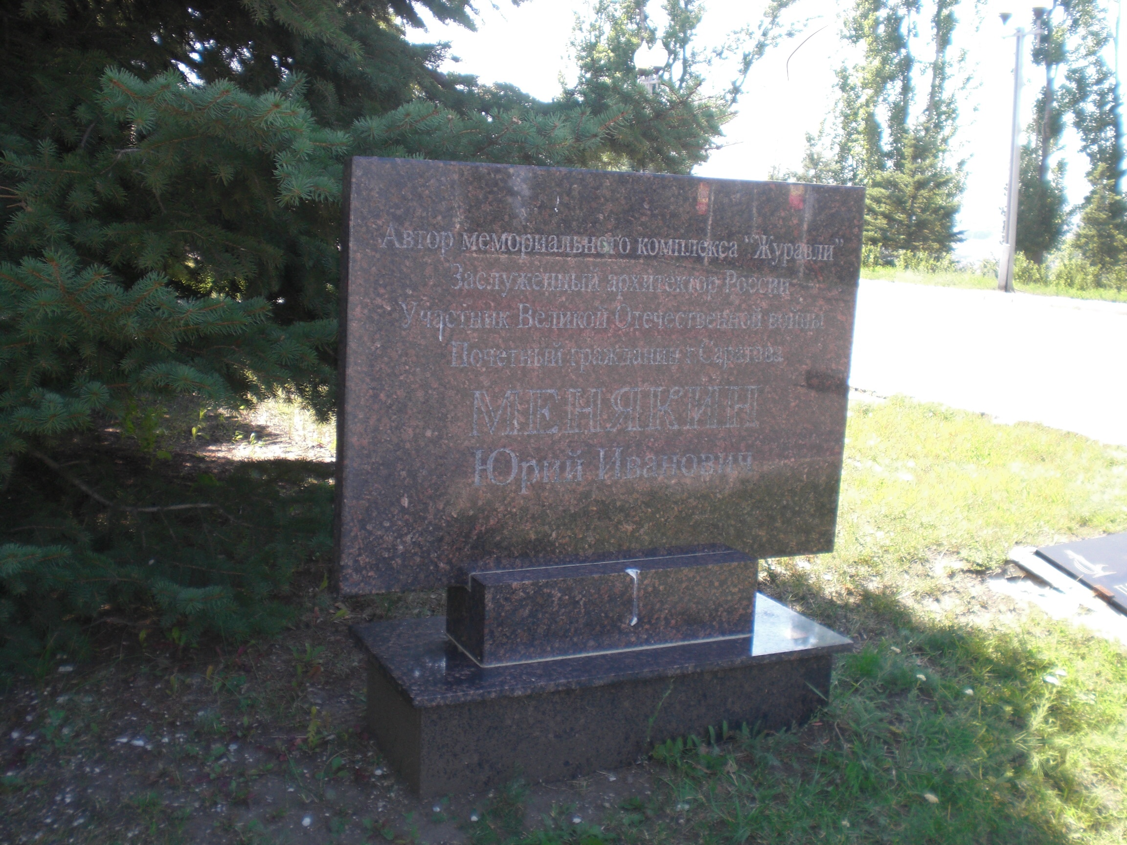 Автор мемориального комплекса Журавли Менякин Ю.И. Памятная плита на входе комплекса.